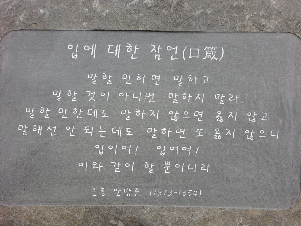 안방준의 대표 작품